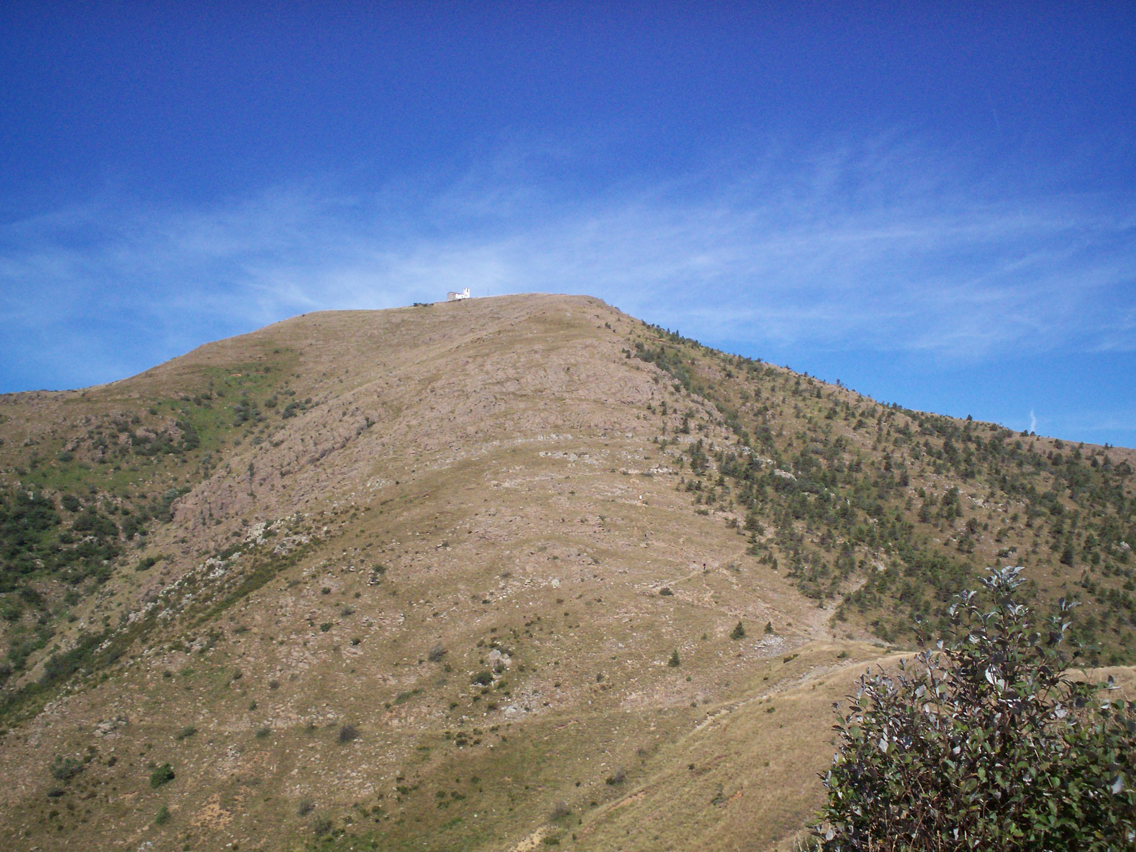 monte tobbio visto da passo della dagliola